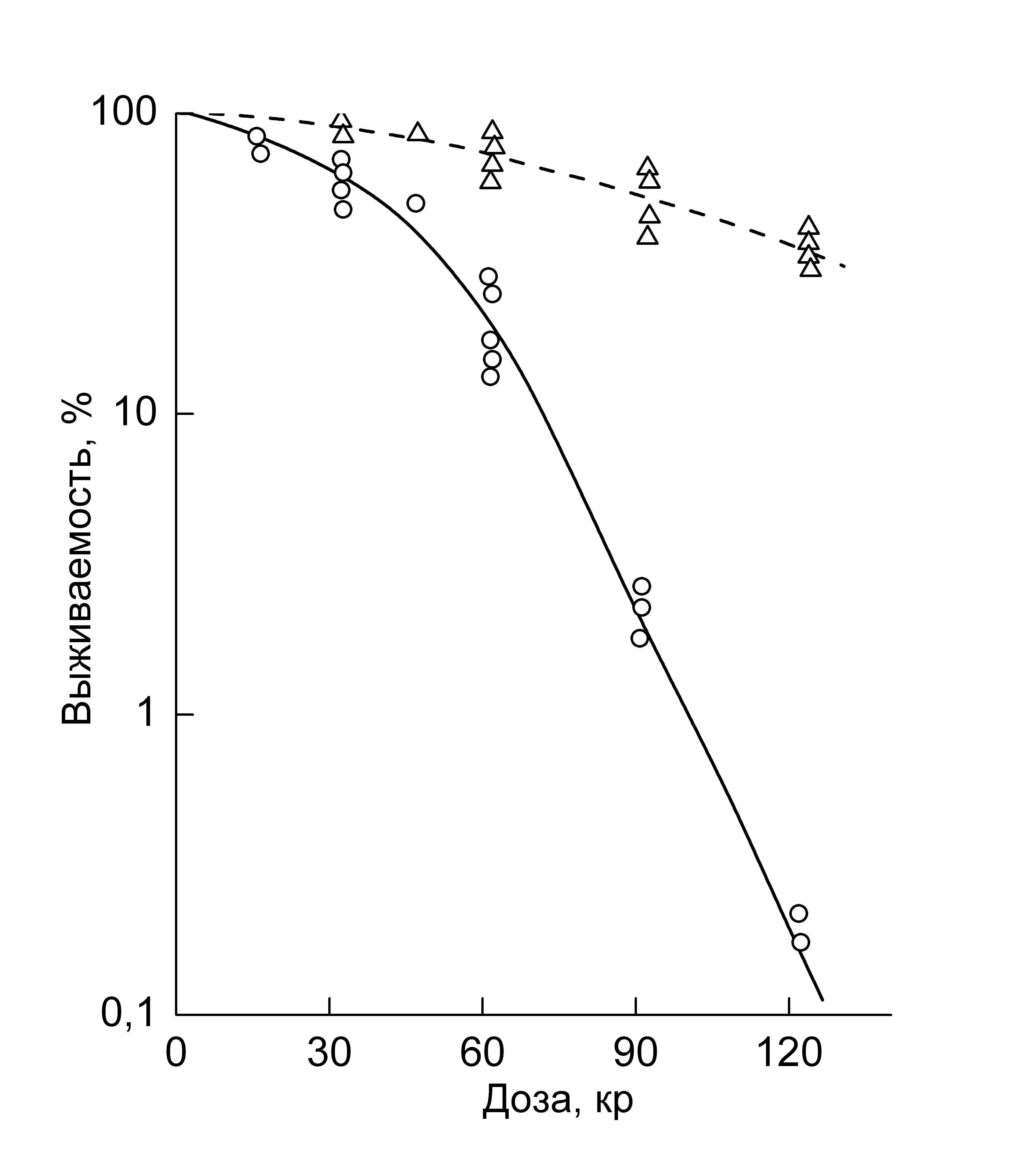 Кривые выживания дрожжевых клеток после облучения гамма-лучами: сплошная линия — высев на питательную среду непосредственно после облучения; пунктирная —через 24—48 часов после облучения (кривая восстановления).